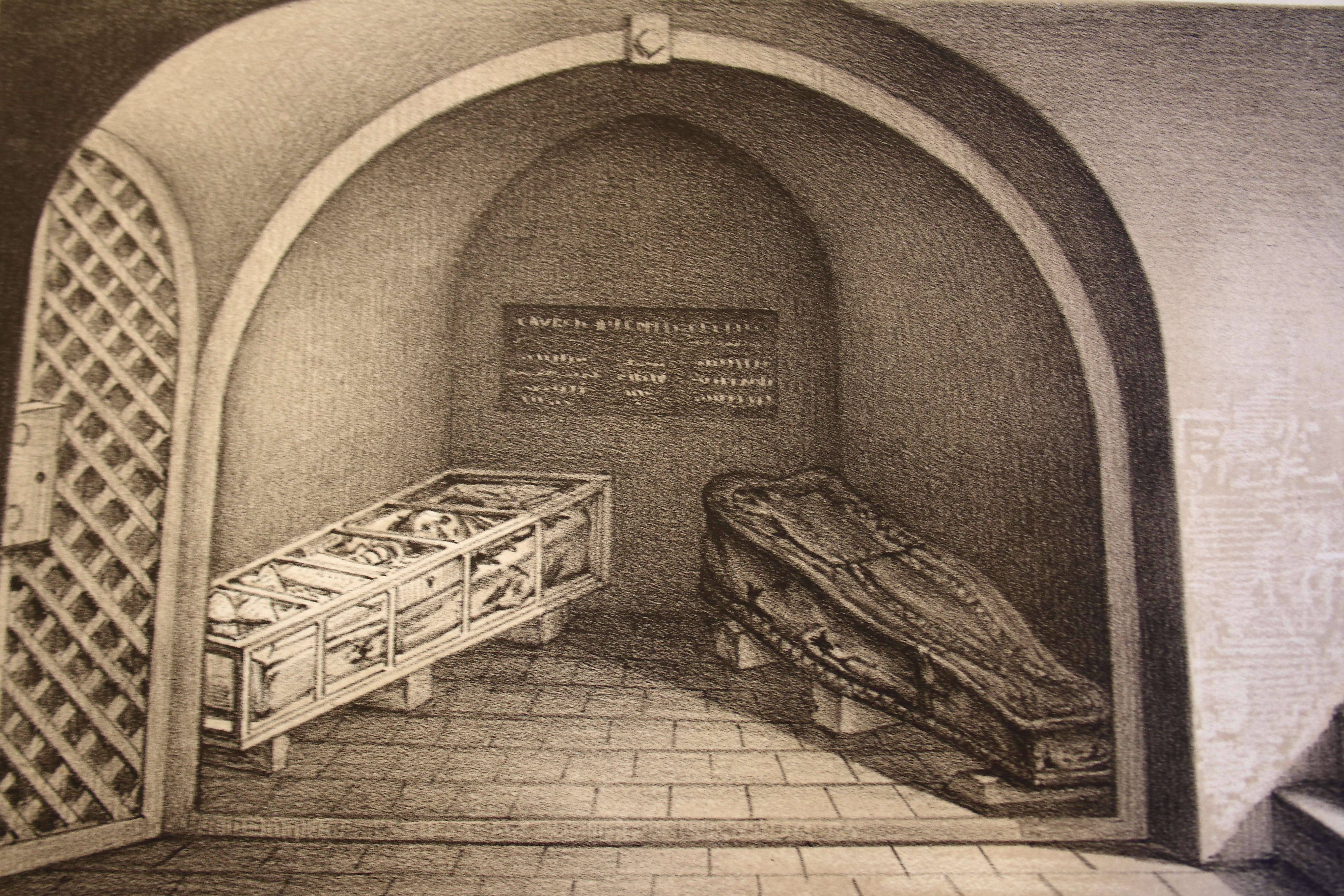 Egmontcrypte, Markt, Zottegem, (in: 'Histoire du procès et de la mort du comte d'Egmont, décapité le 5 juin 1568, enseveli à Sotteghem', Eugène Van Damme, 1869)